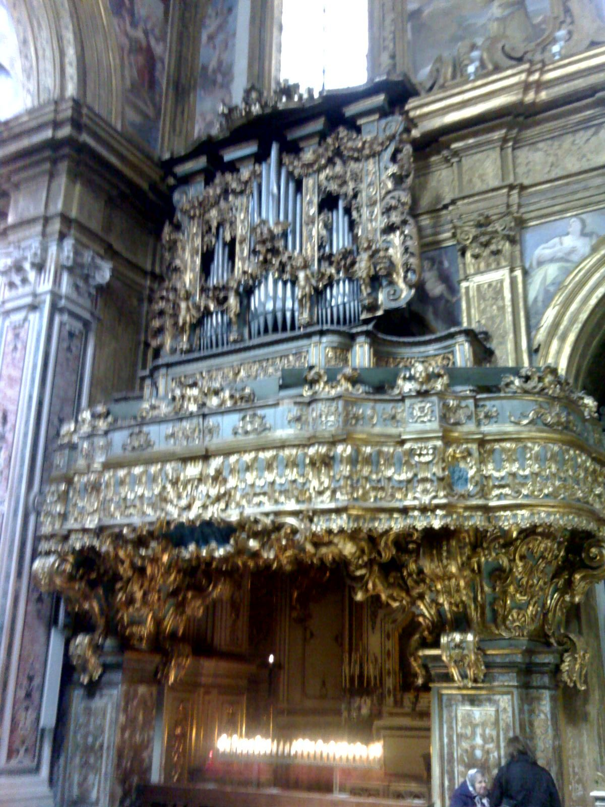 Organo destro della chiesa di san Gregorio Armeno (Napoli)